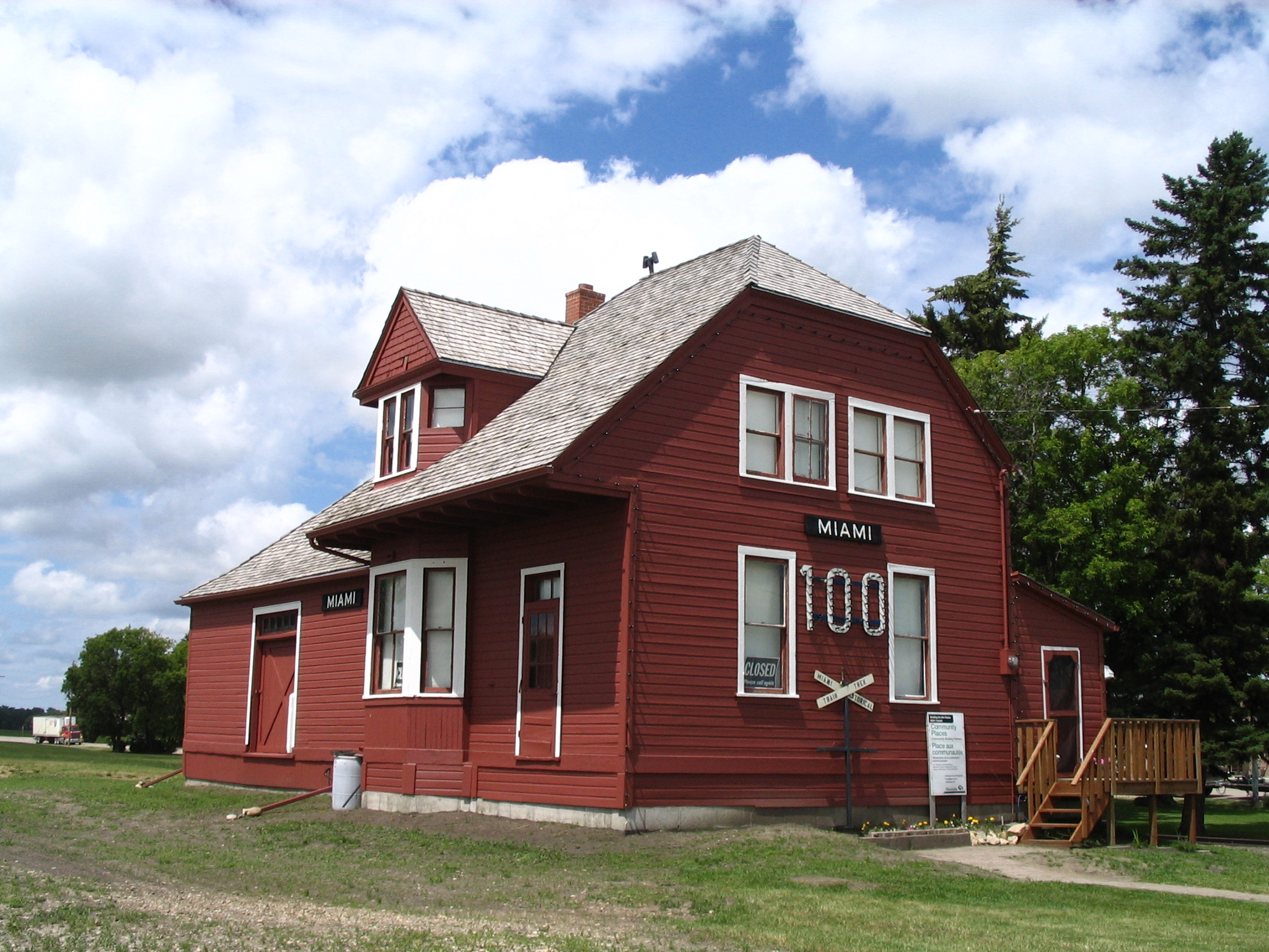 La gare de Miami vu du chemin de fer